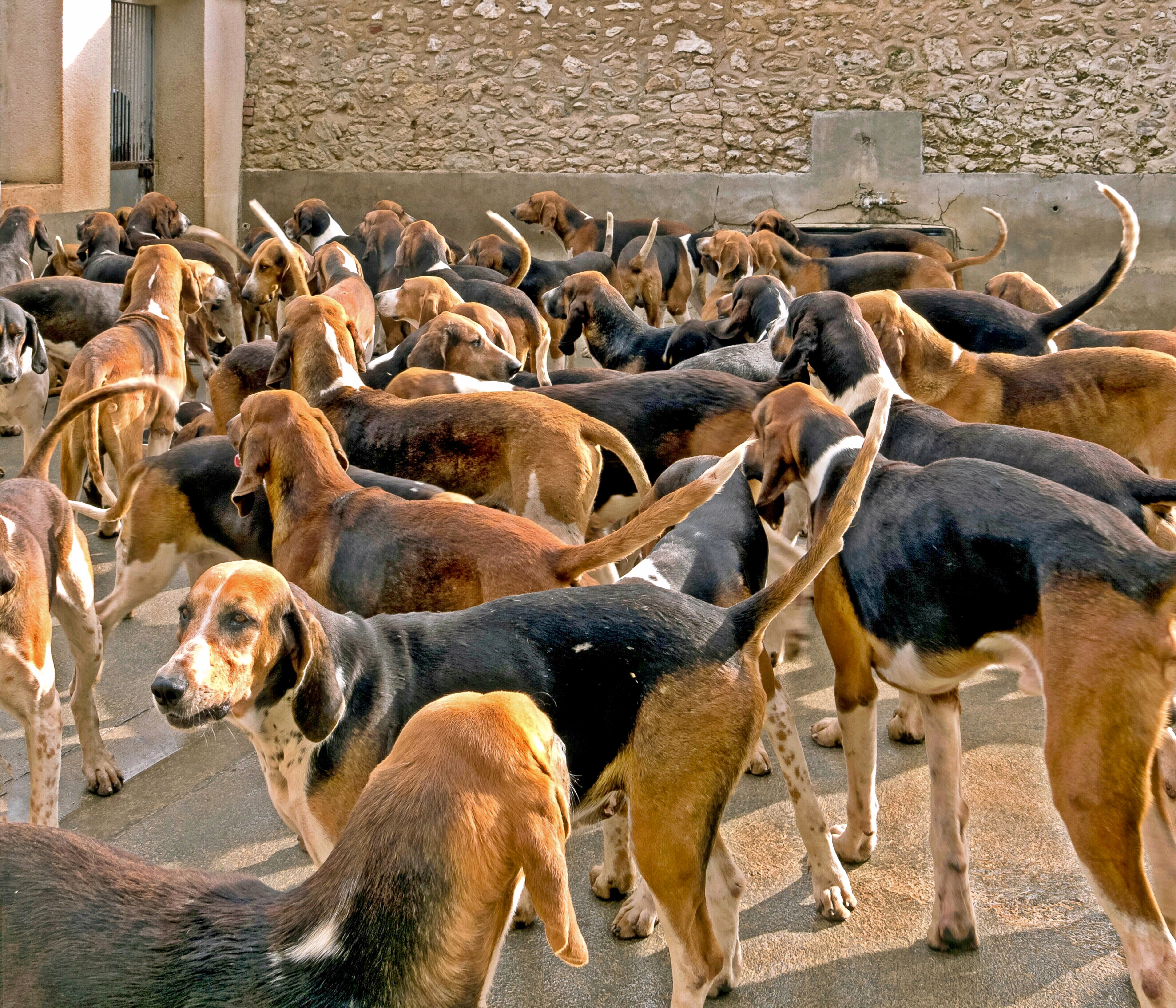 Im Zwinger von Schloss Cheverny leben rund 100 edle Jagdhunde, mit denen der Schlossherr zwischen Oktober und Ende März zweimal wöchentlich auf Parforcejagd geht. Die Hunde sind eine Züchtung aus aus englischem Foxhound und französischem Poitevin.